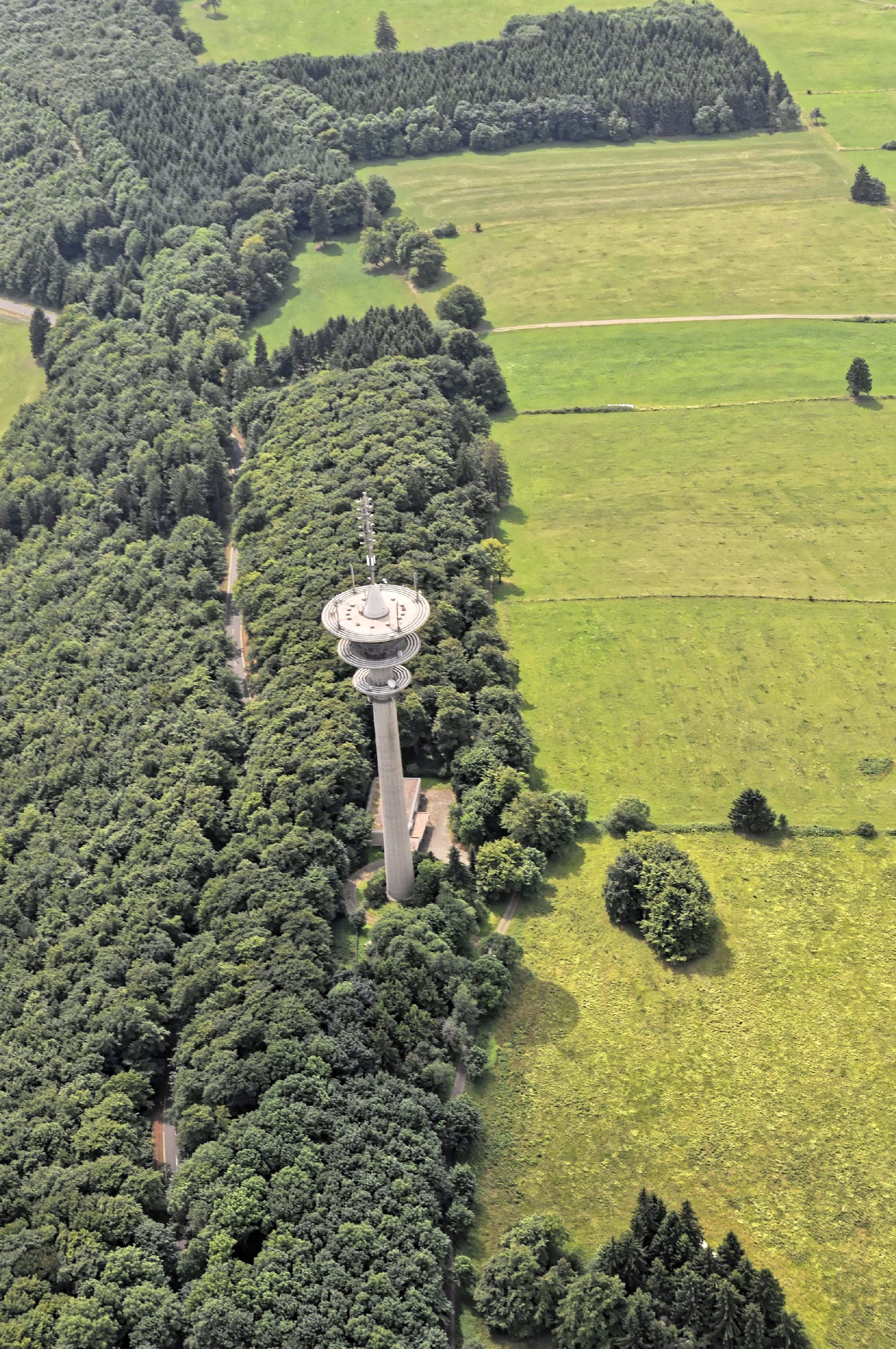 Bilder vom Flug Nordholz-Hammelburg 2015: Fernmeldeturm Eisenberg